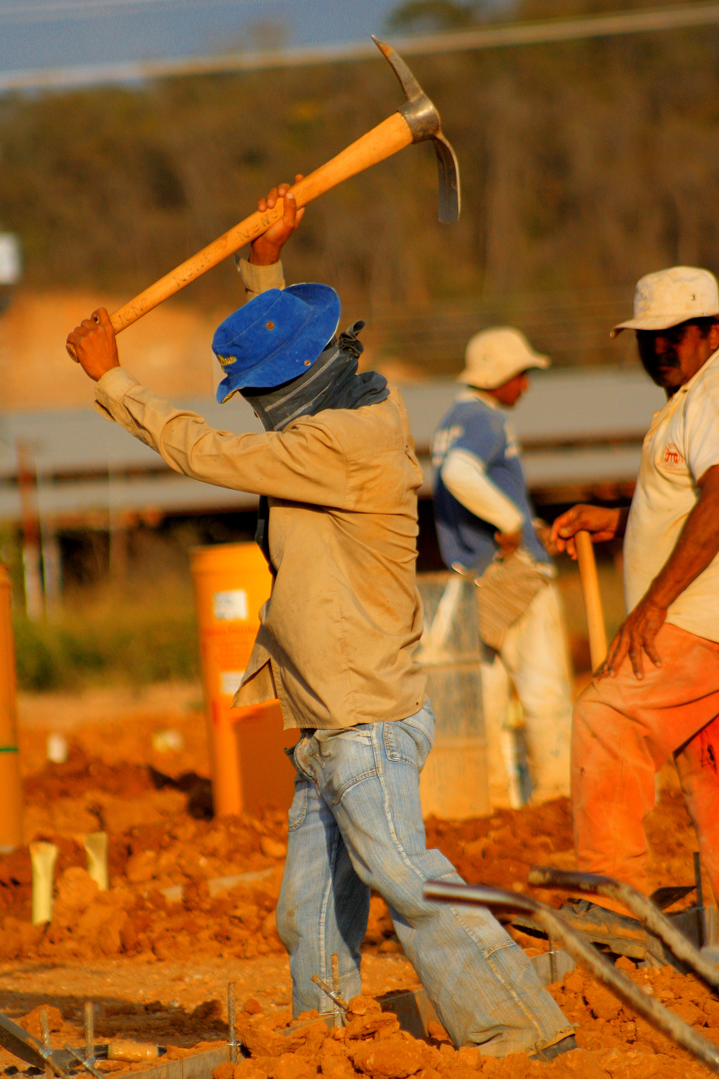 obrero en las afueras de Barquisimeto, Lara Venezuela Working man in the outside of Barquisimeto, Venezuela